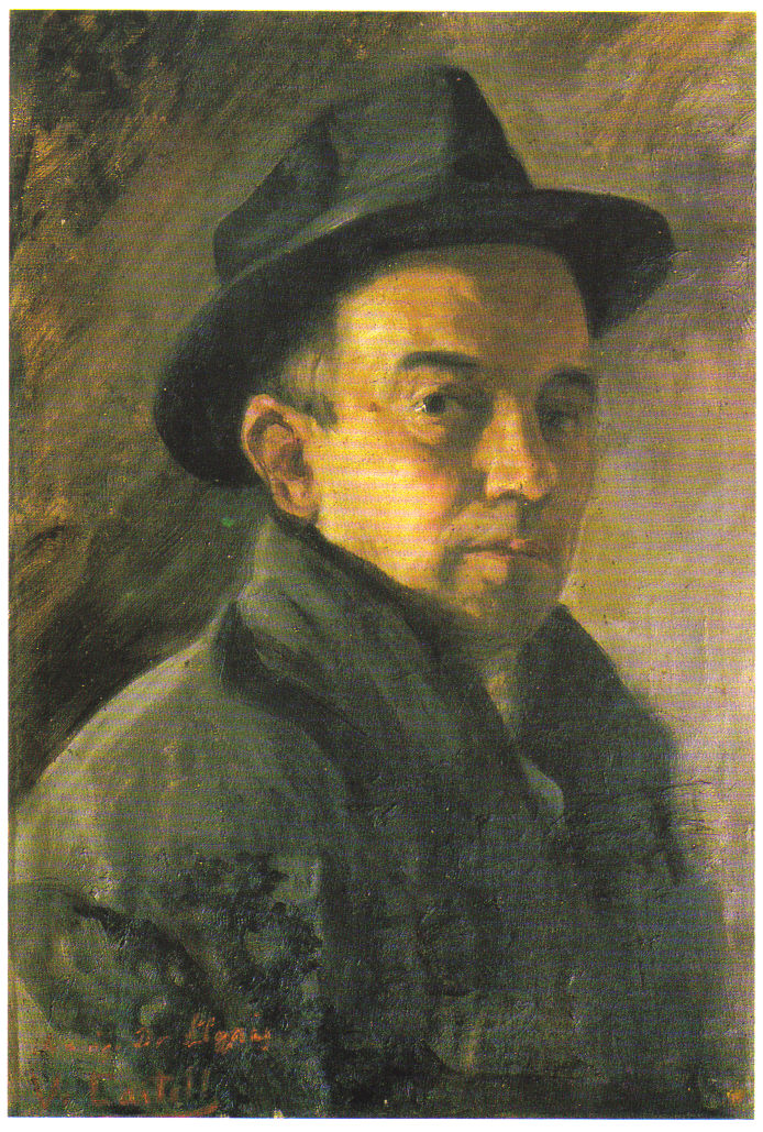 Autorretrato de Vicente Castell, 1906. Colección particular, Castellón